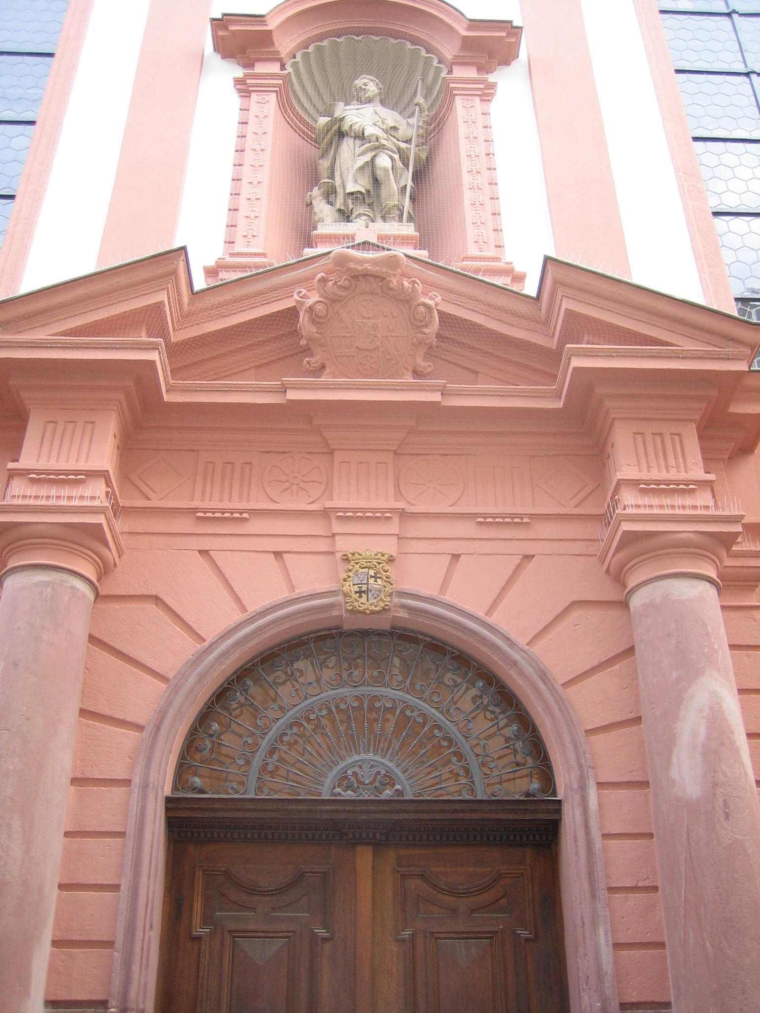 Portal-Rochuskapelle Mainz. Rochusstraße 9: ehemaliges Rochusspital; monumentaler dreigeschossiger barocker Mansardwalmdachbau mit mittiger St.-Rochuskapelle, 1721–29, Architekt Johann Baptist Ferolski; am Säulenportal der Kapelle Wappen Kurfürst Franz Lothar von Schönborn, Statue des Heiligen Rochus, 1727 von Burkhard Zamels